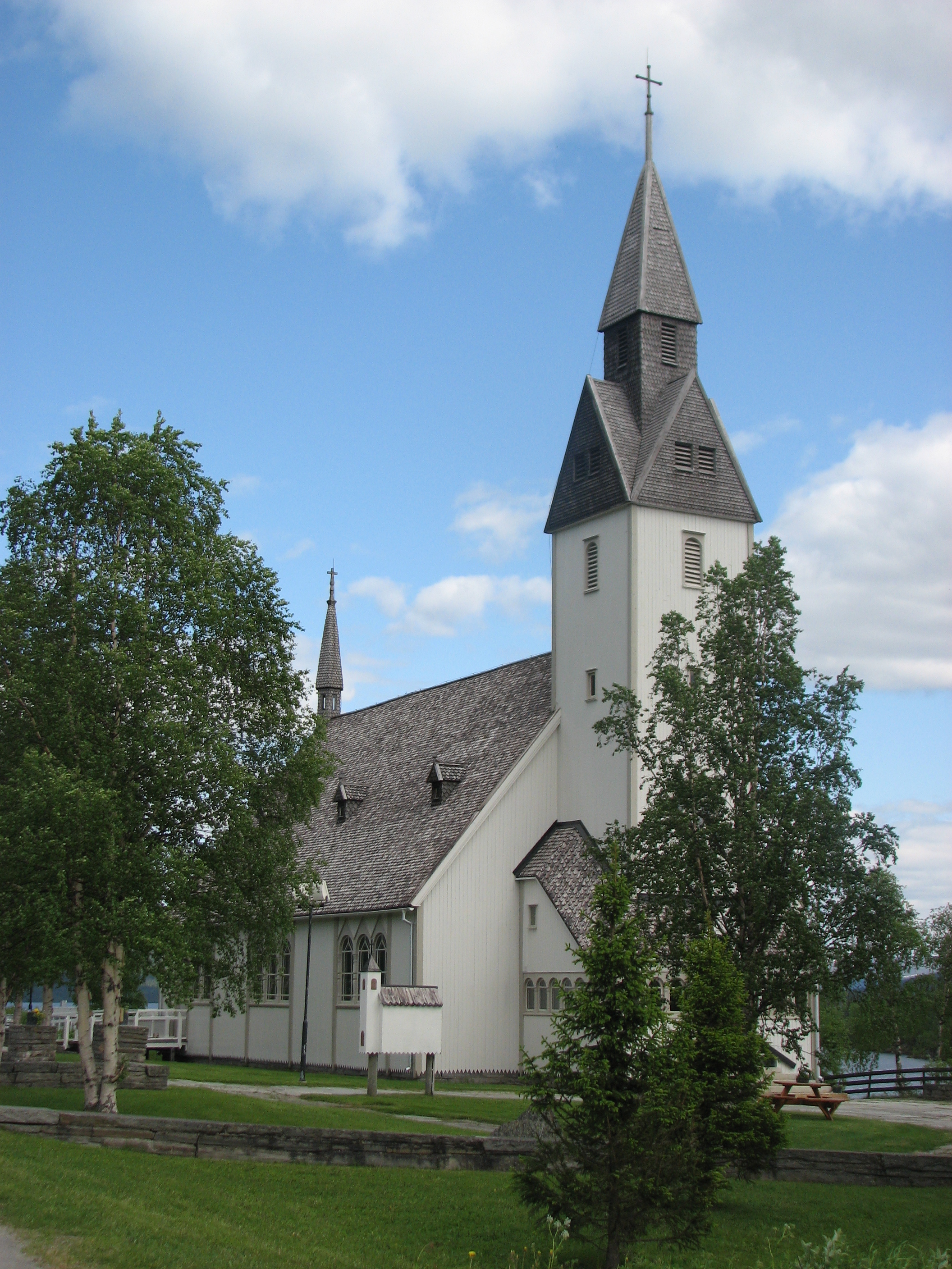 Tärna kyrka, Luleå, Sweden 2011